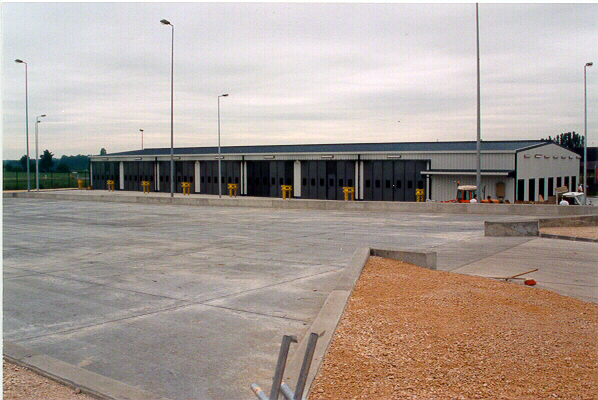 511e régiment du train à Auxonne. Abri véhicules Granges HAUTES